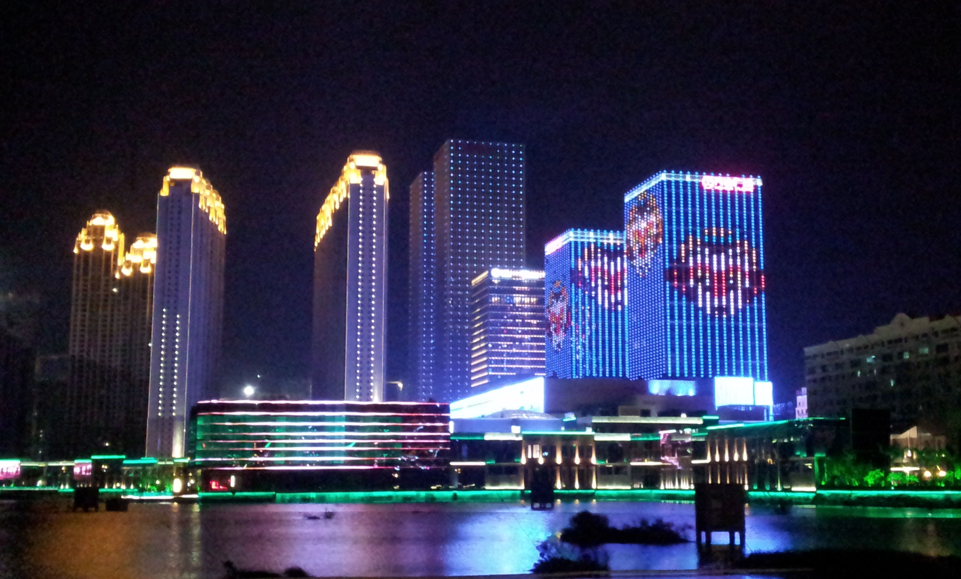 泉州浦西万达广场